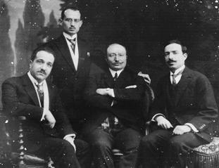 Troisième délégation tunisienne à Paris (décembre 1924) composée de maître Ahmed Safi, secrétaire général du Destour et chef de la délégation assis au centre, de maître Salah Farhat, secrétaire général adjoint, assis à gauche, de Taoufik Madani, secrétaire du parti, debout et de maître Taieb Jémaïl, assis à droite.